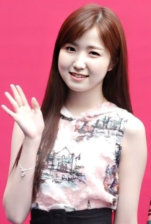 그룹 '아이즈원(혜원, 히토미, 채원)'이 20일 오후 서울 중구 동대문디자인플라자(DDP)에서 열린 '2019F/W 서울패션위크' 빅팍 컬렉션에 참석했다.